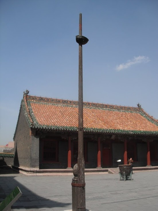 中文（中国大陆）: 沈阳故宫一建筑物，拍摄于2011年4月28日。